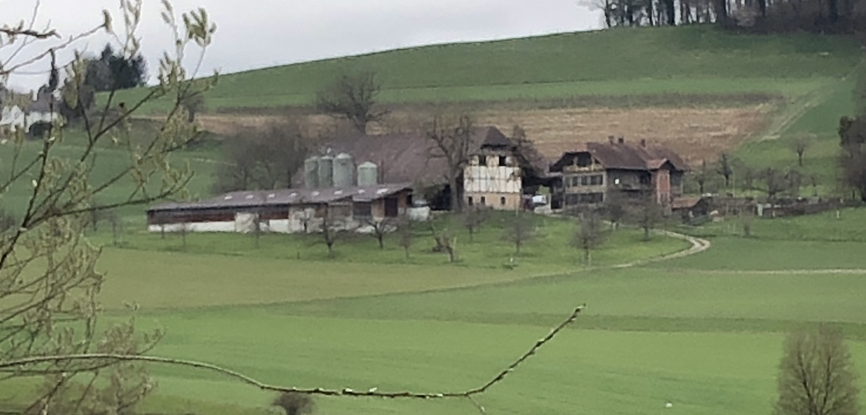 Riedern Weiler